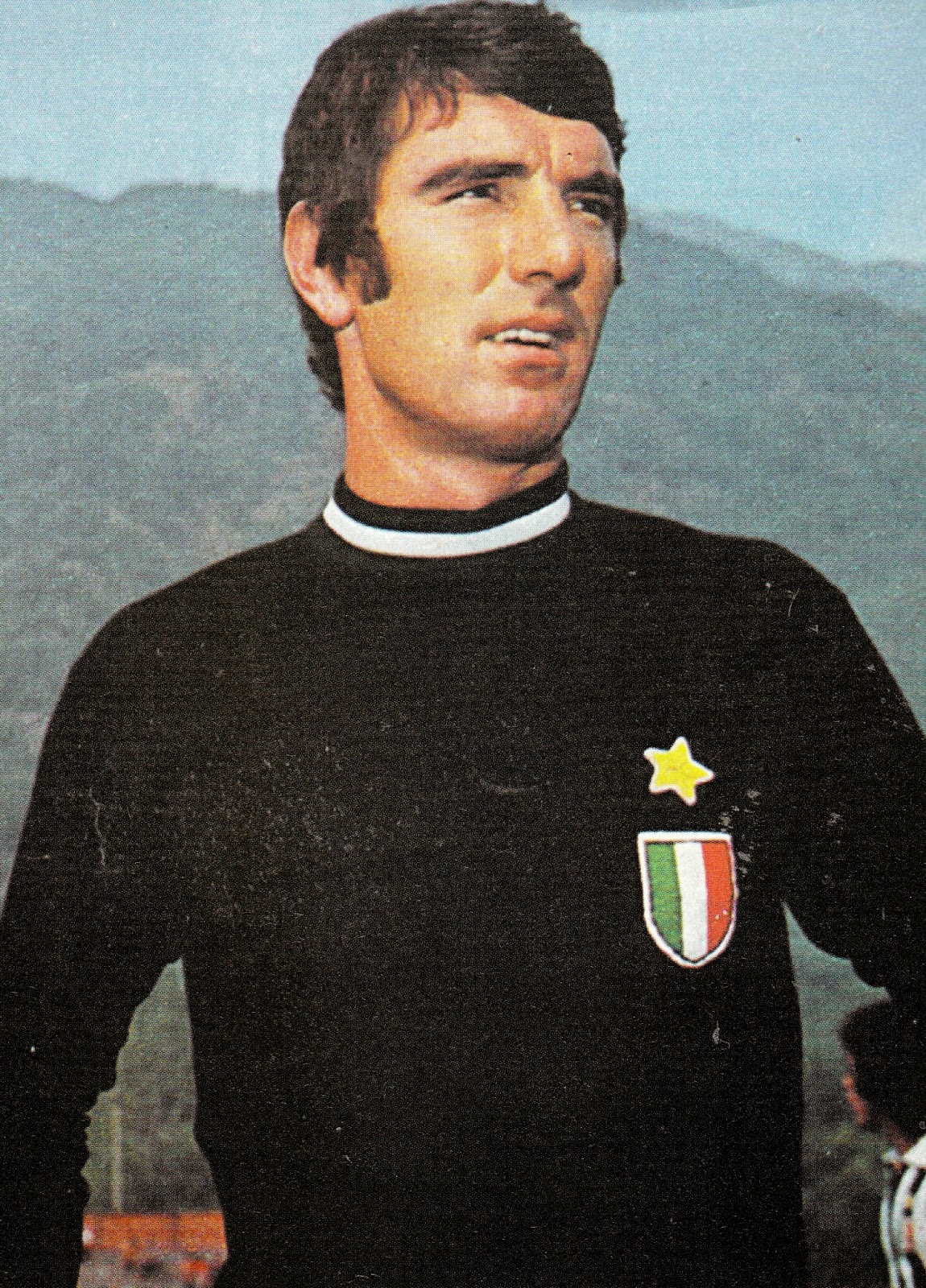 Il portiere di calcio italiano Dino Zoff alla Juventus nella prima metà degli anni 70 del XX secolo.